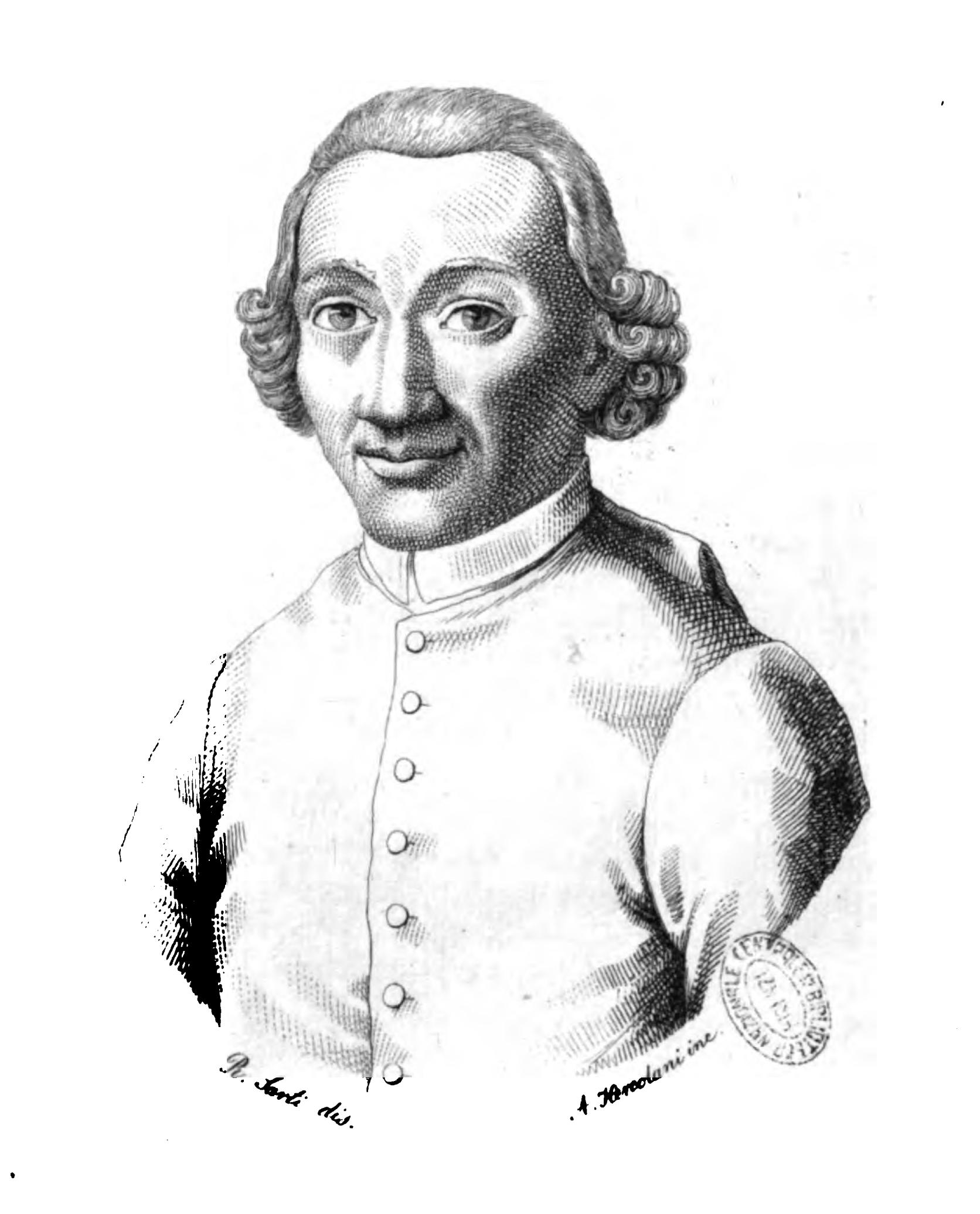 Ritratto di Antonio Zirardini.